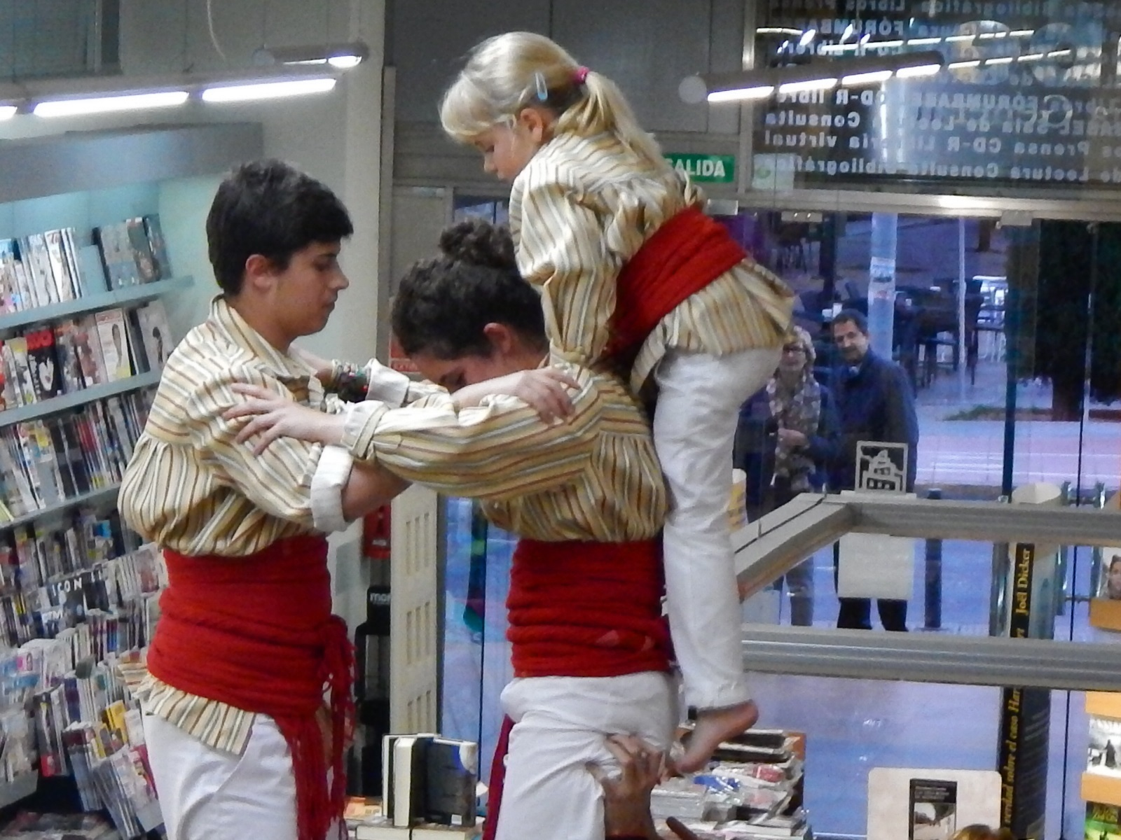 Acruació de la Conlloga Muixeranga de Castelló a Babel, amb l'antic uniforme.